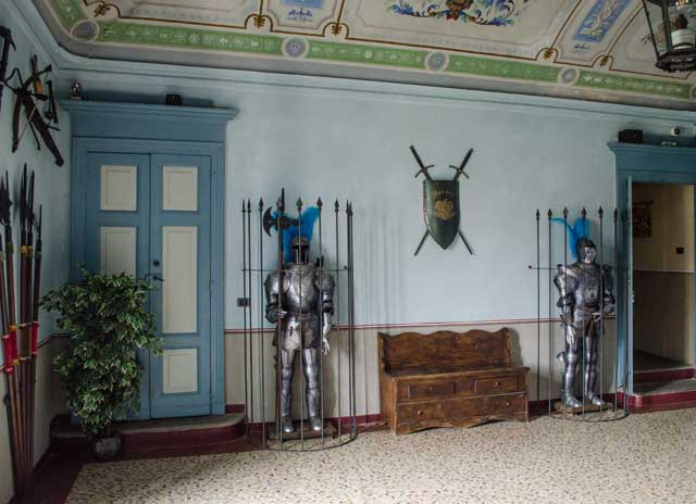 Salone delle Battaglie con riproduzioni di armature ed armi antiche